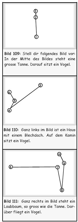 Simplified sequence of eye movements when subject is seeing a blank screen and is verbally instructed to imagine a scene